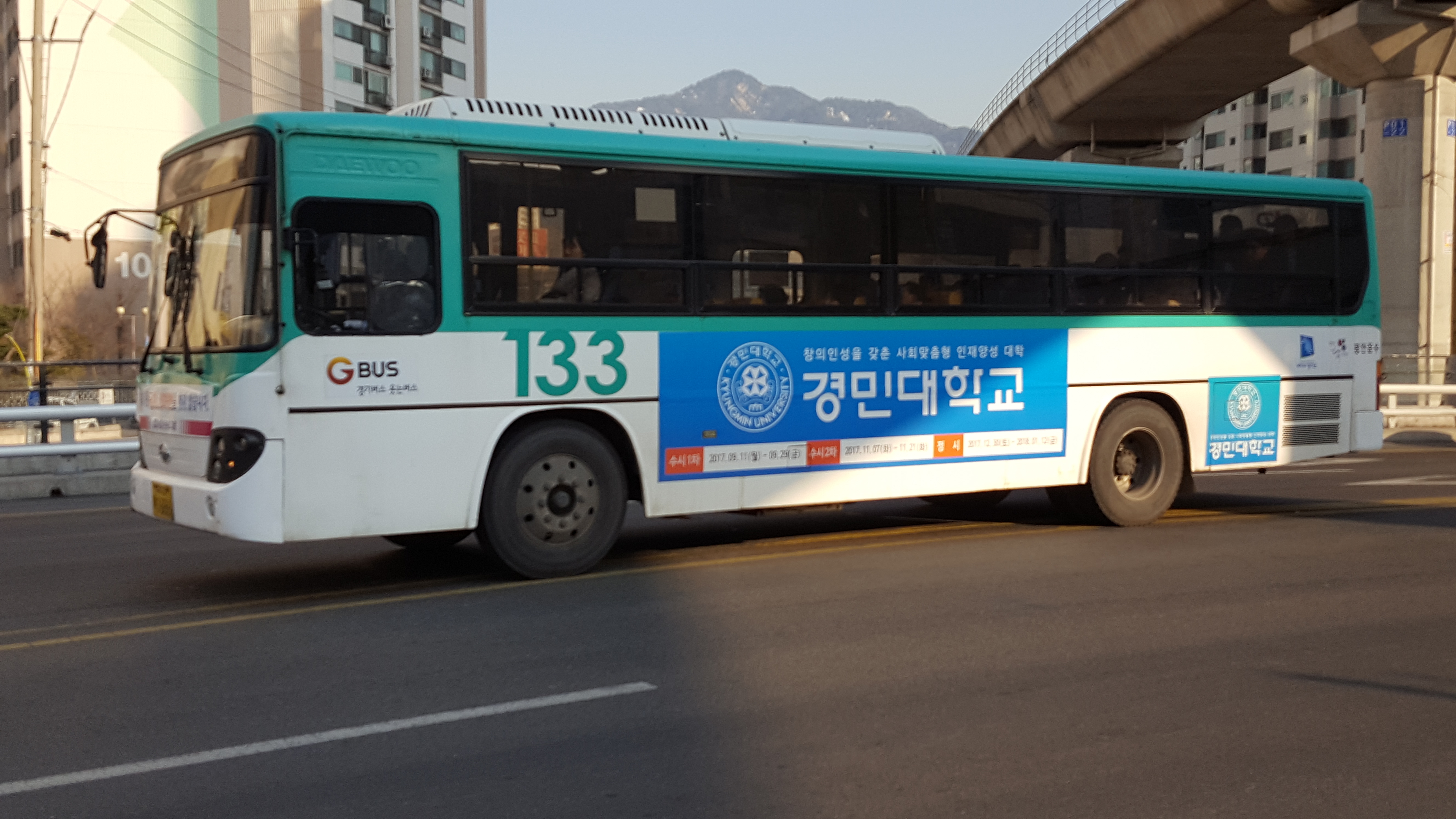 평안운수의 의정부 일반시내 133번 버스